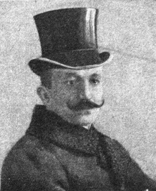 Österreichischer Politiker, Reichsratswahl 1907, Name siehe Dateiname